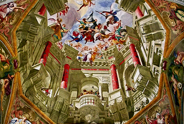 Falsa cúpula de Andrea Pozzo, com A Glorificação de S. Francesco Saverio